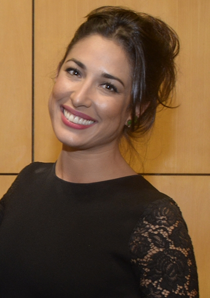 'Giselle Itié Ramos (Cidade do México, 3 de outubro de 1981) é uma atriz brasileira nascida no México.